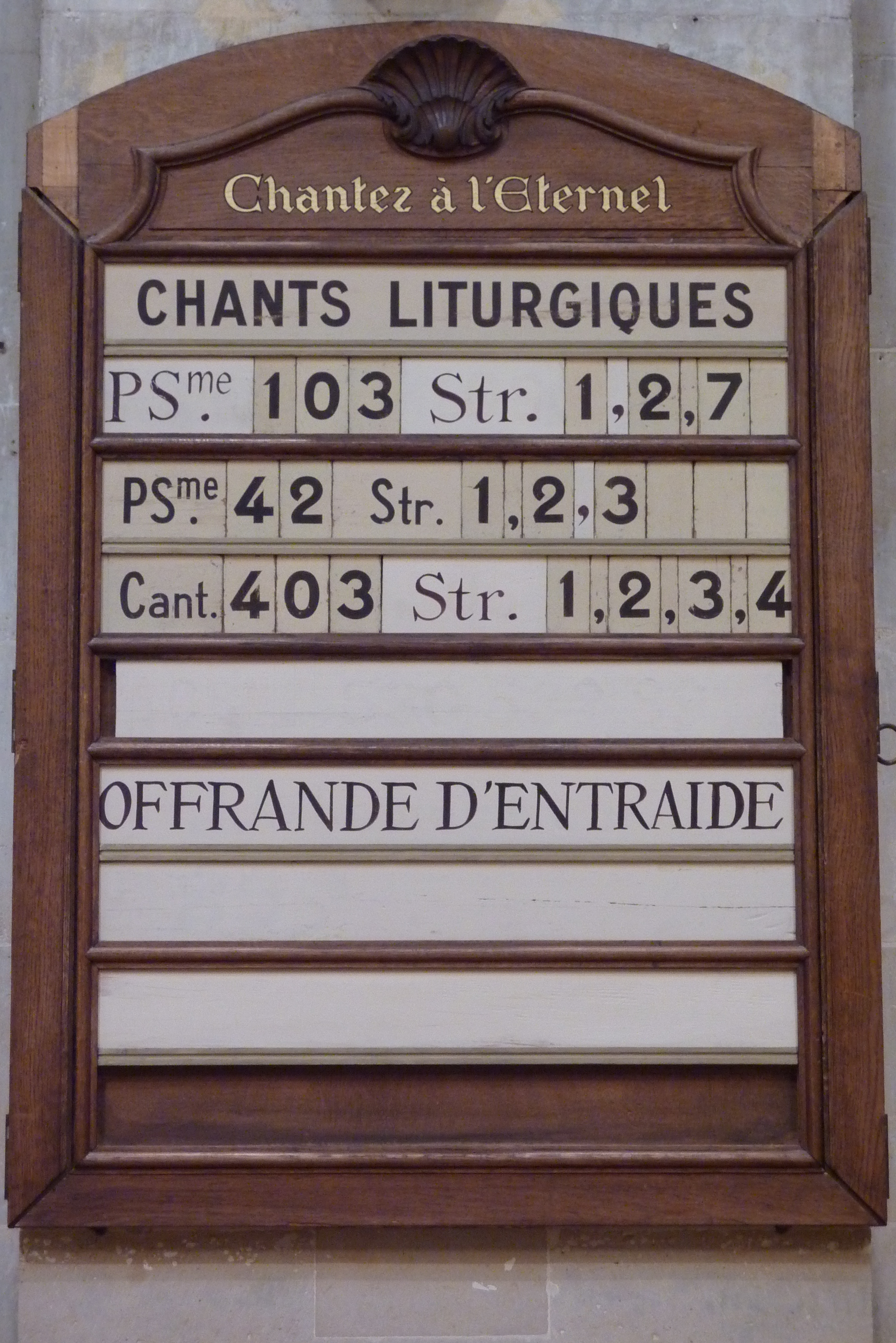 Tafel mit den Nummern der Lieder im Oratoire du Louvre in Paris